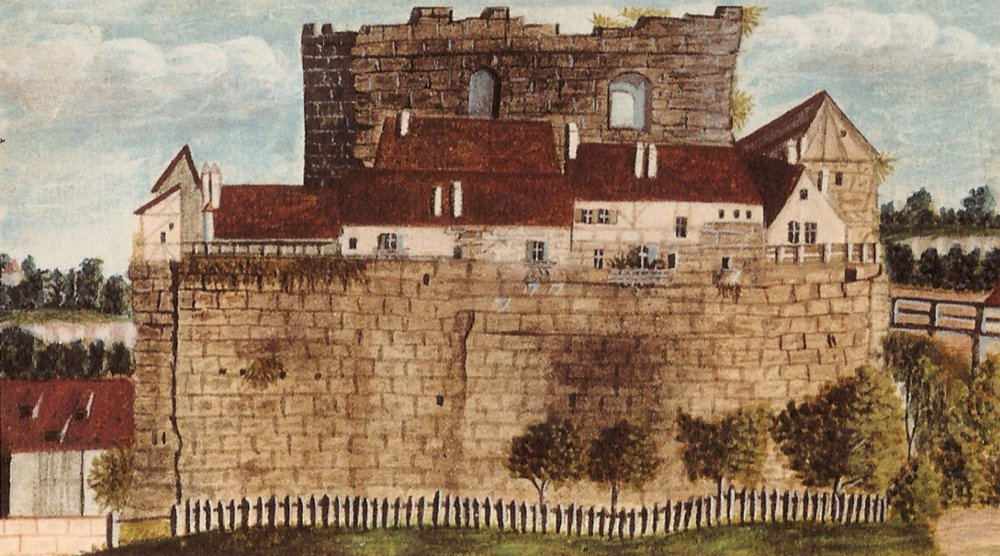 Ruine der Veste Erlangen von Süden. Die Ruine wurde 1783/84 abgetragen.